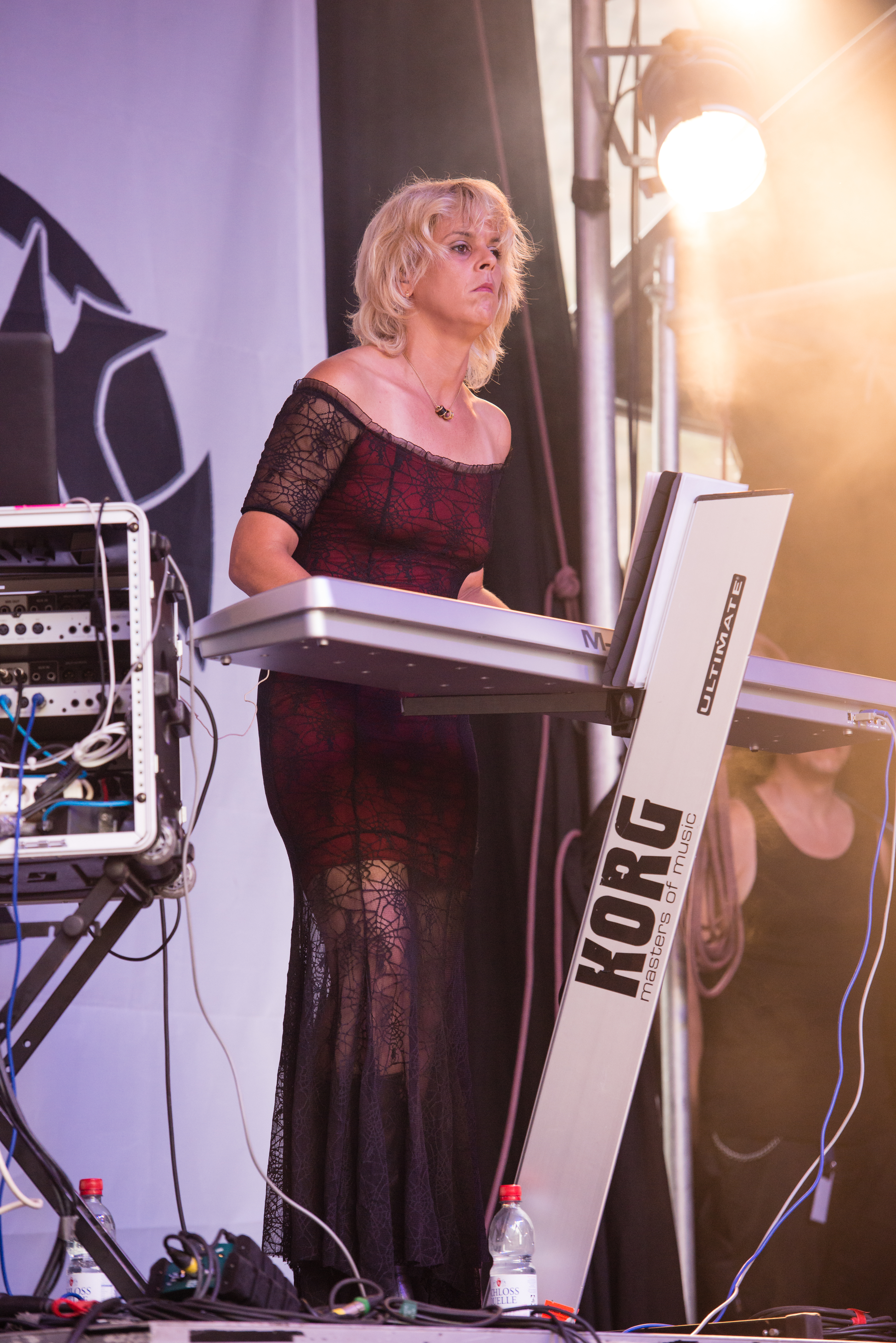 'Castle Rock 2014 - Mülheim an der Ruhr': 'Crematory'